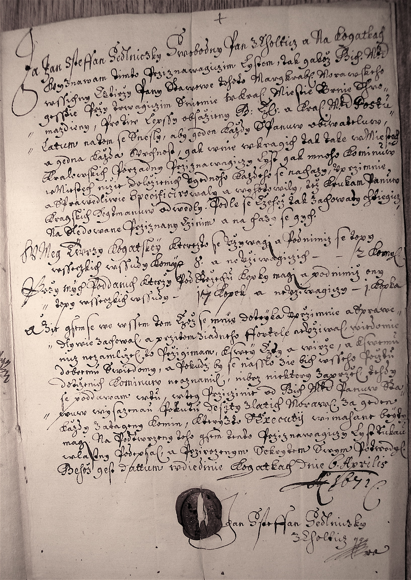 Jan Stephan Sedlnický, podává 6.4.1671 své vyjádření ke stížnosti na jeho chování vůči poddaným v Kojátkách.